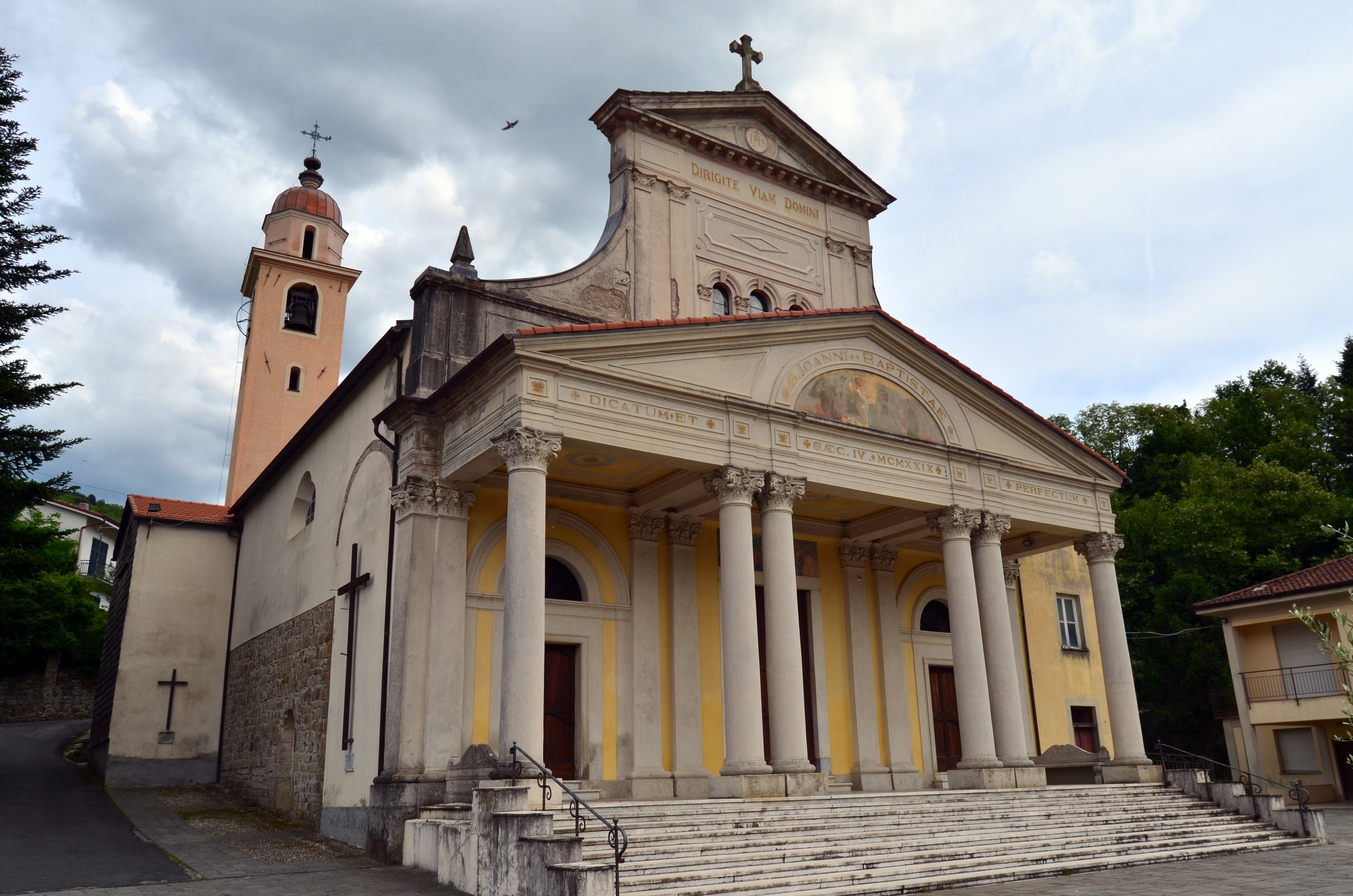 Tracce delle medievali mura di Levanto, Liguria, Italia Chiesa di San Giovanni Battista, Varese Ligure, Liguria, Italia